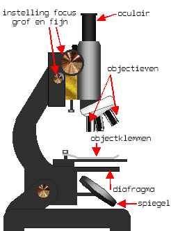 uit engelse wiki Diagram of a microscope. Drawn by Theresa knott 15:43 Mar 27, 2003 (UTC) The drawing tools that come with Microsoft Word were used to create this diagram, which was then cut and pasted into Paint Shop Pro, for cleaning up and converting to .png format. :en:User:Heron then copied the image back into paint shop pro and corrected a spelling mistake.